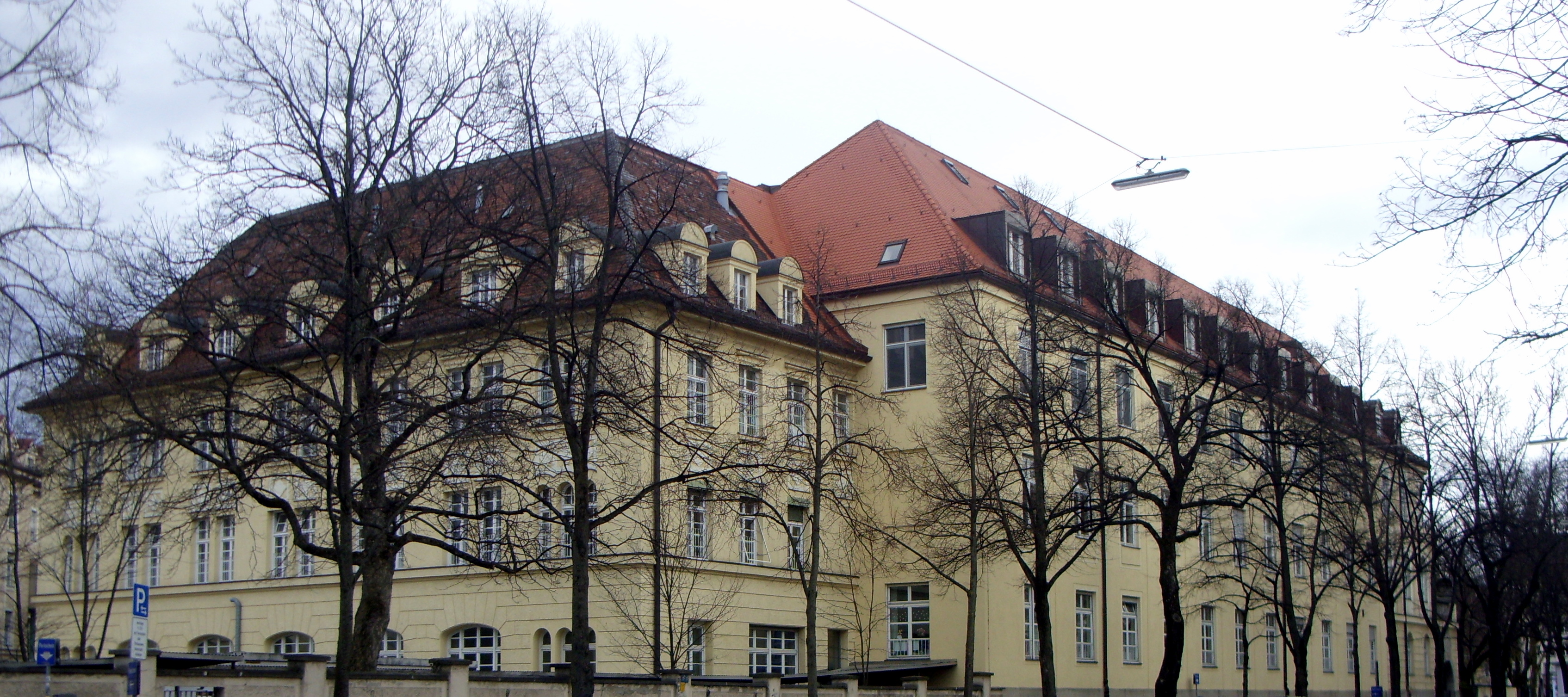 Anbau (1908-09) des Dr. vn Haunerschen Kinderspitals an der Goethestraße